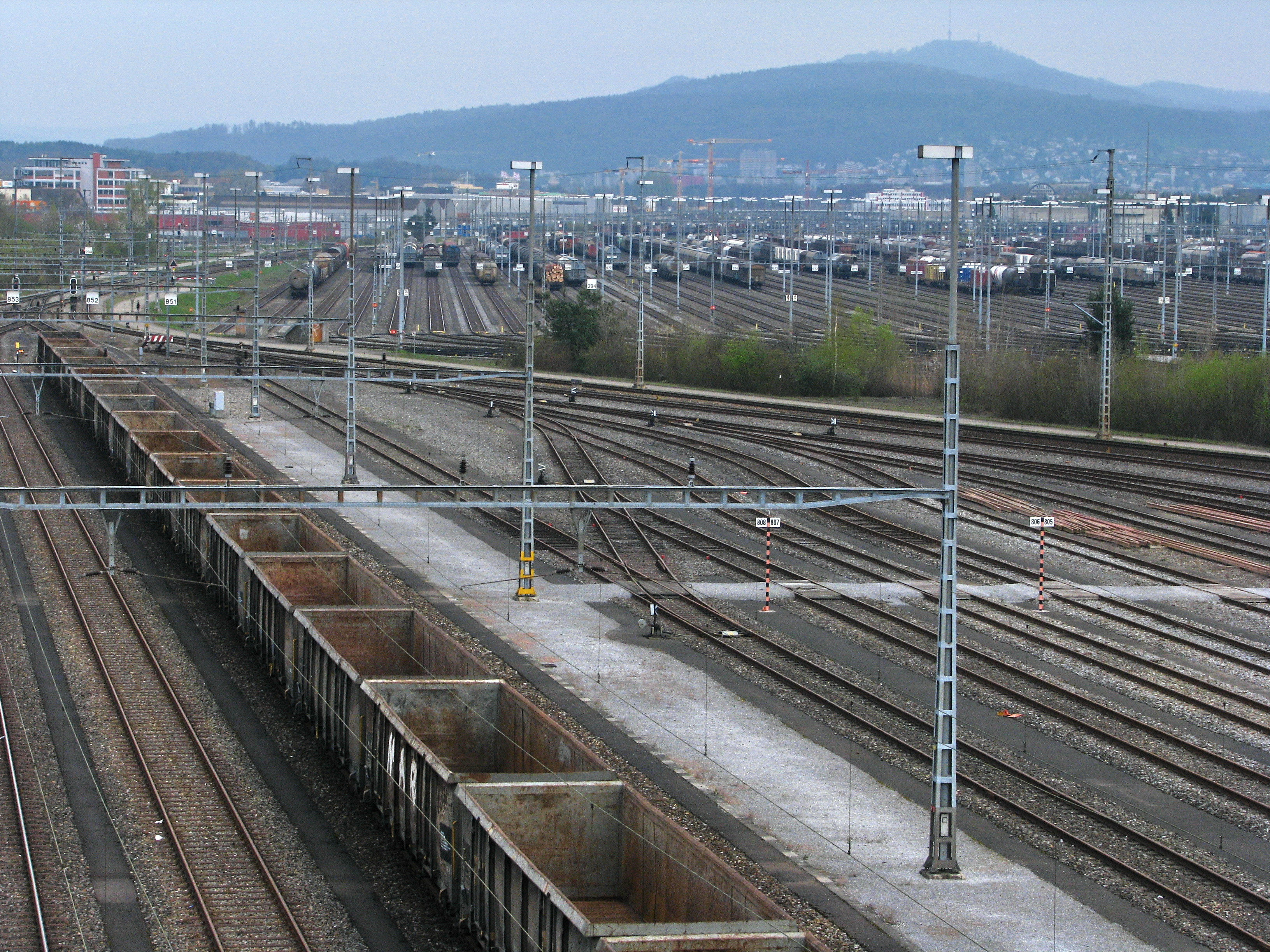 Rangierbahnhof Limmattal between Oetwil an der Limmat and Spreitenbach in the Limmat Valley (Switzerland).